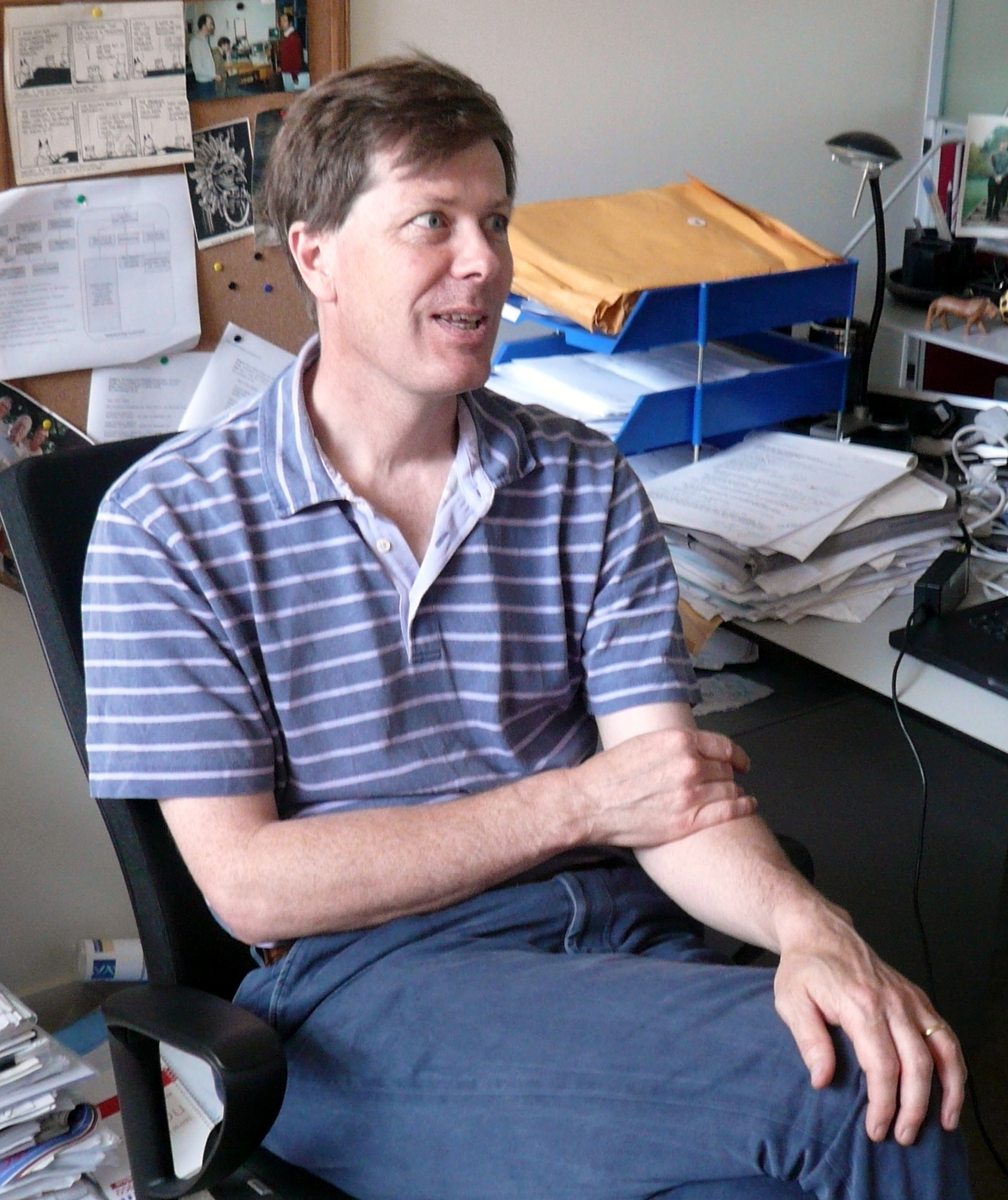 Richard Durbin, Wellcome-Sanger, Cambridge, UK.JPG